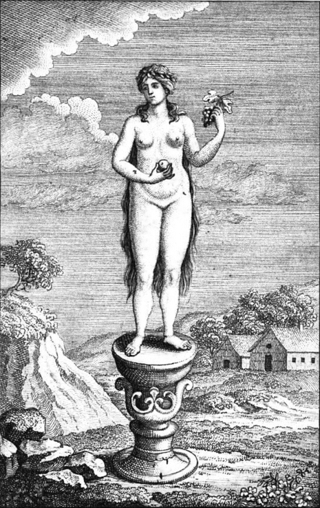 Сива, илл. к книге Мифология славянская и российская А.С. Кайсарова.